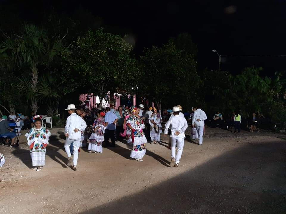 Esta imagen proviene de la comunidad de San Fabian, donde en el mes de Enero se realiza una pequeña vaquería a beneficio de los 3 Reyes magos.